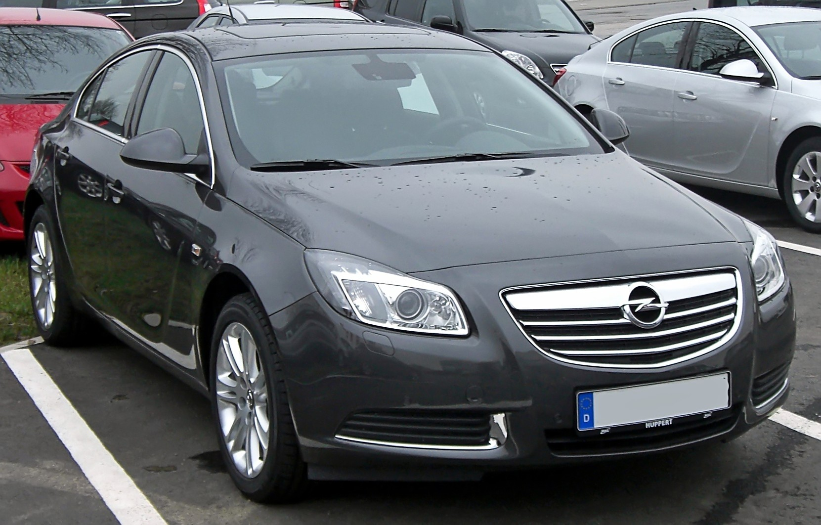 Opel Insignia